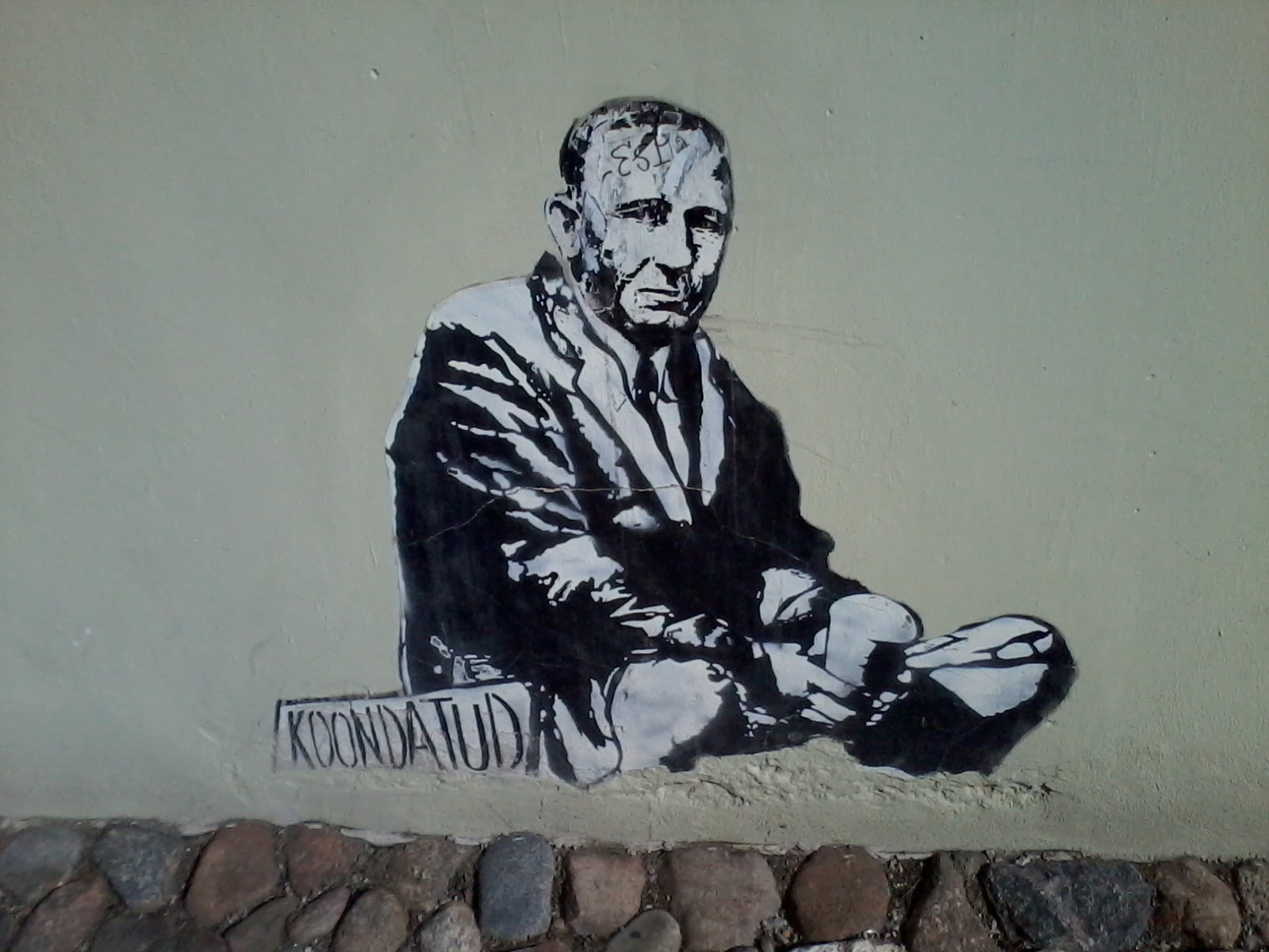 Tammsaaret kujutav grafiti Tartus, Tartu Linnaraamatukogu seinal